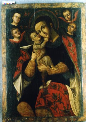 Пасовская (Цареградская) икона Божией матери из храма Рождества Христова в селе Уланок Суджанского района Курской области